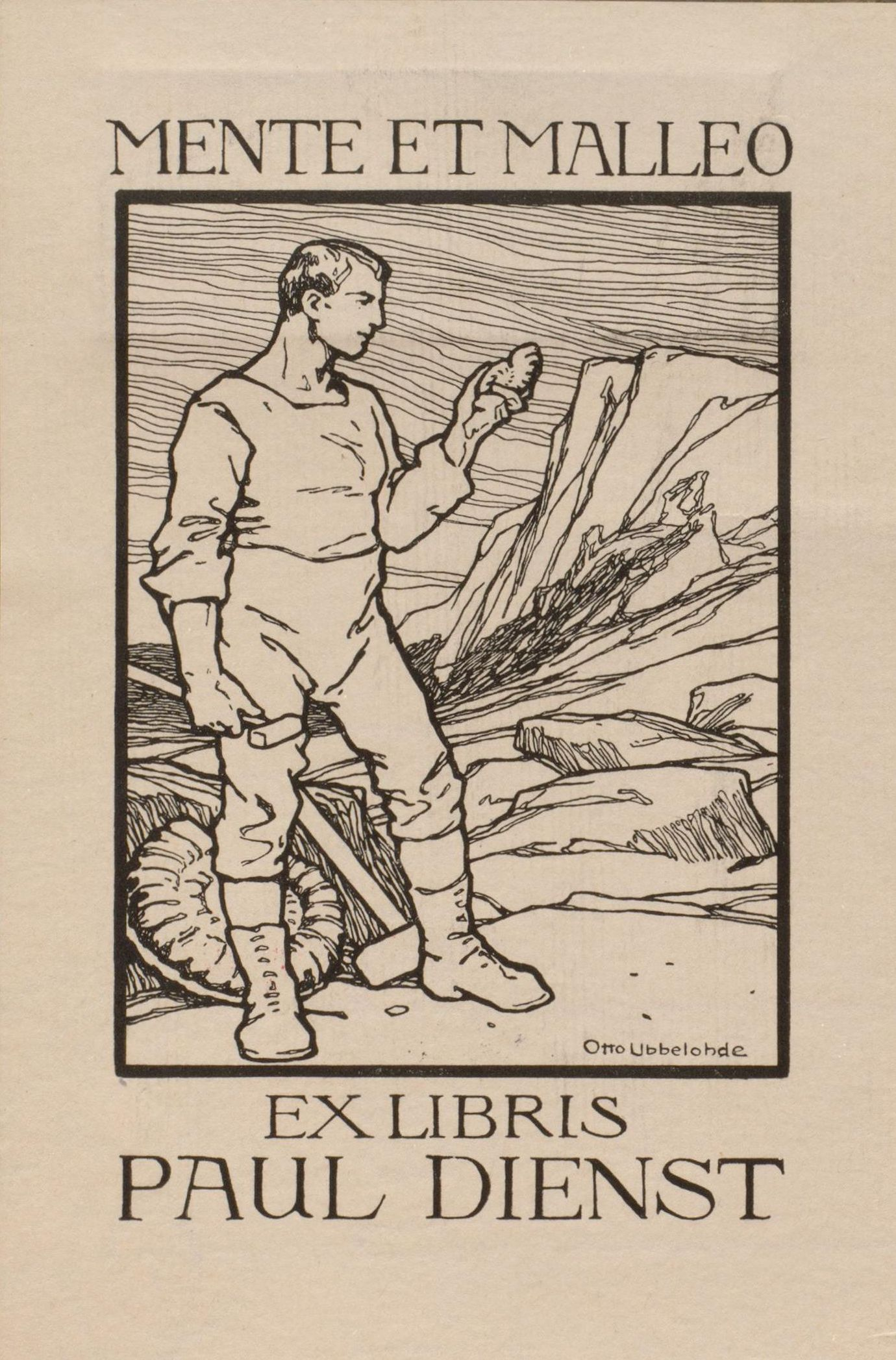 Exlibris von Paul Dienst, entworfen von Otto Ubbelohde